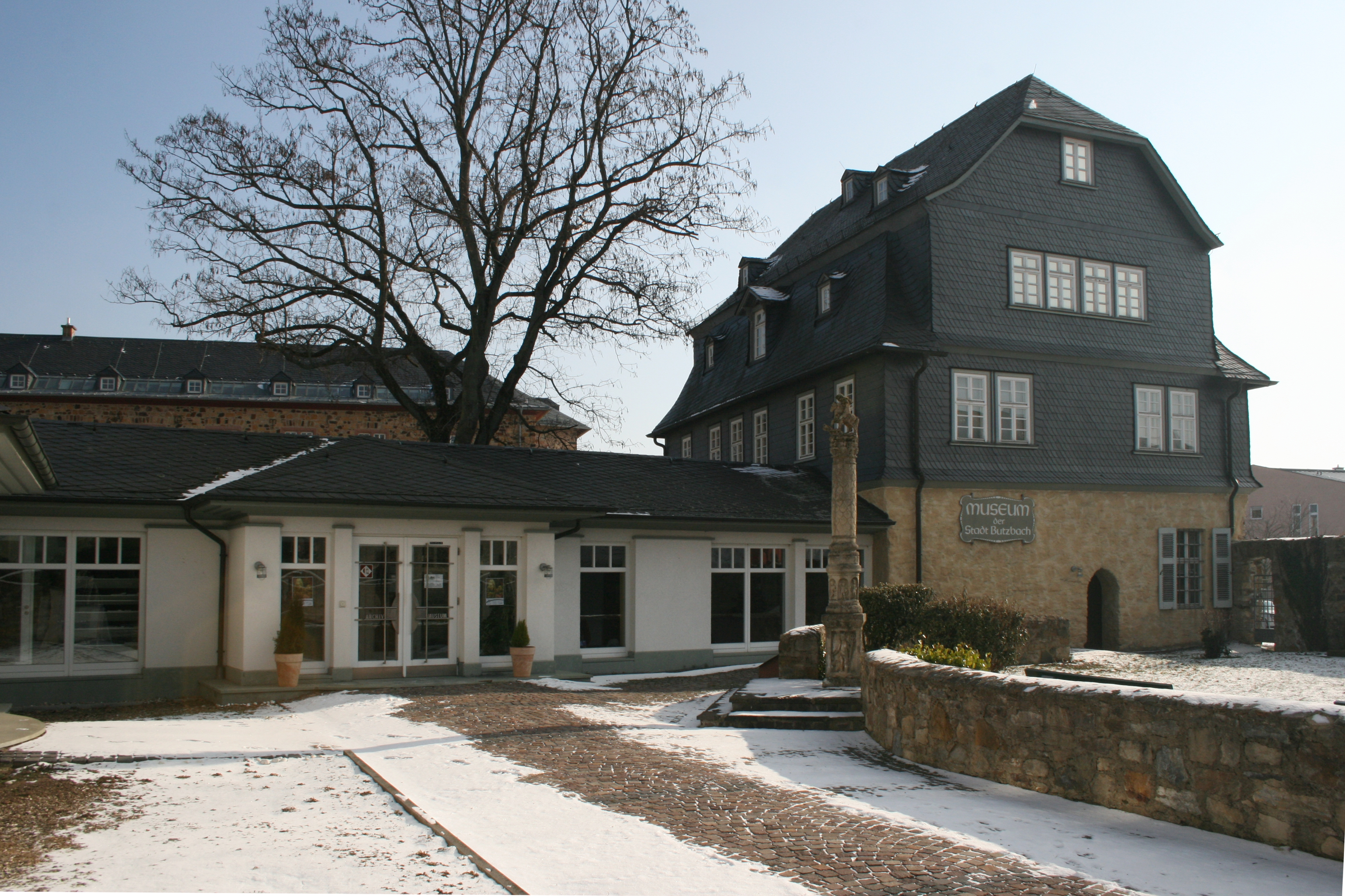 Museum der Stadt Butzbach. Außenansicht mit historischem Solms-Braunfelser Hof rechts und Kopie einer Jupitergigantensäule im Vordergrund.